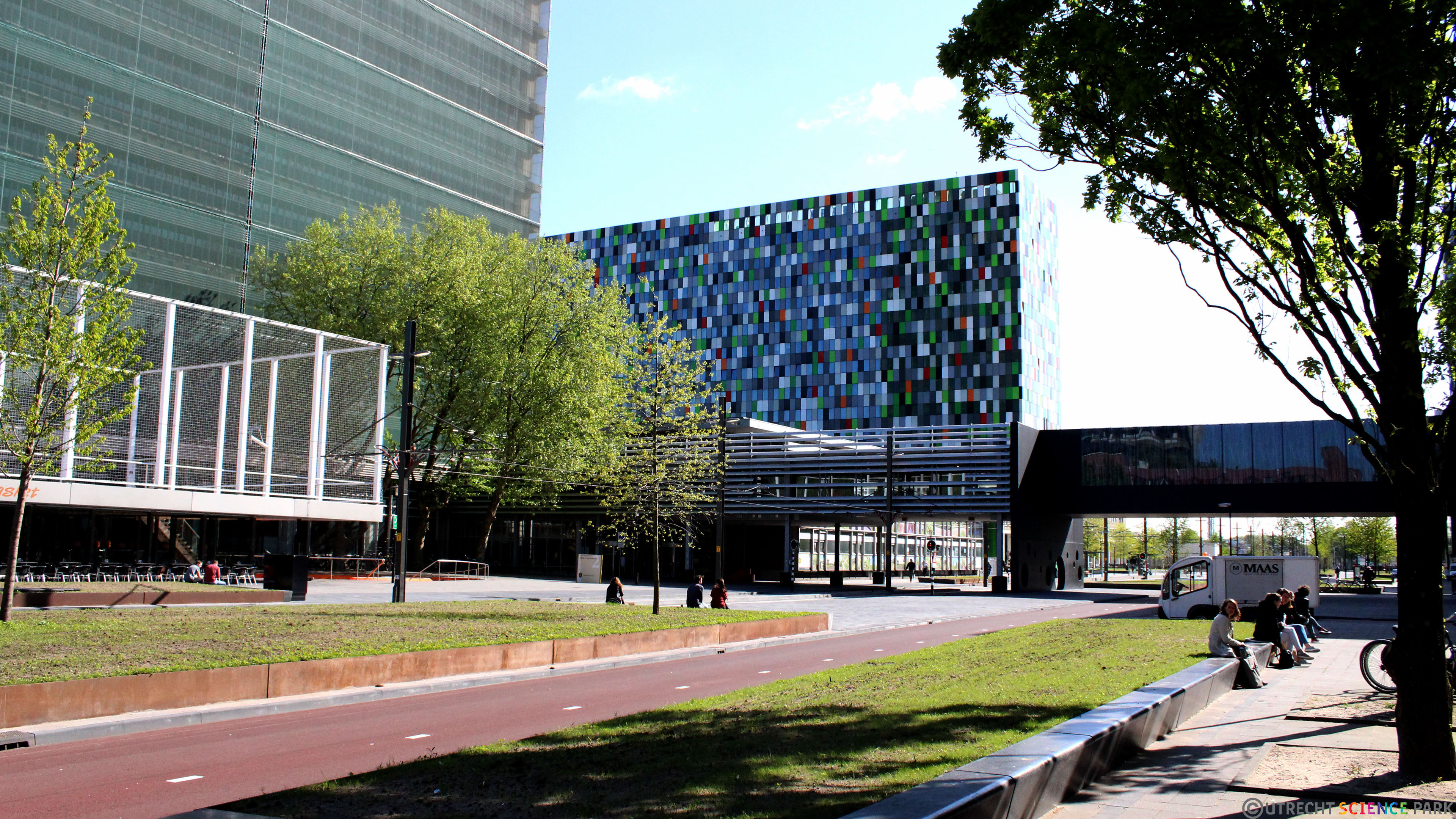 Het Utrecht Science Park, een combinate van wetenschapsinstellingen, studentenhuisvesting en vele diverse bedrijven en organisaties.